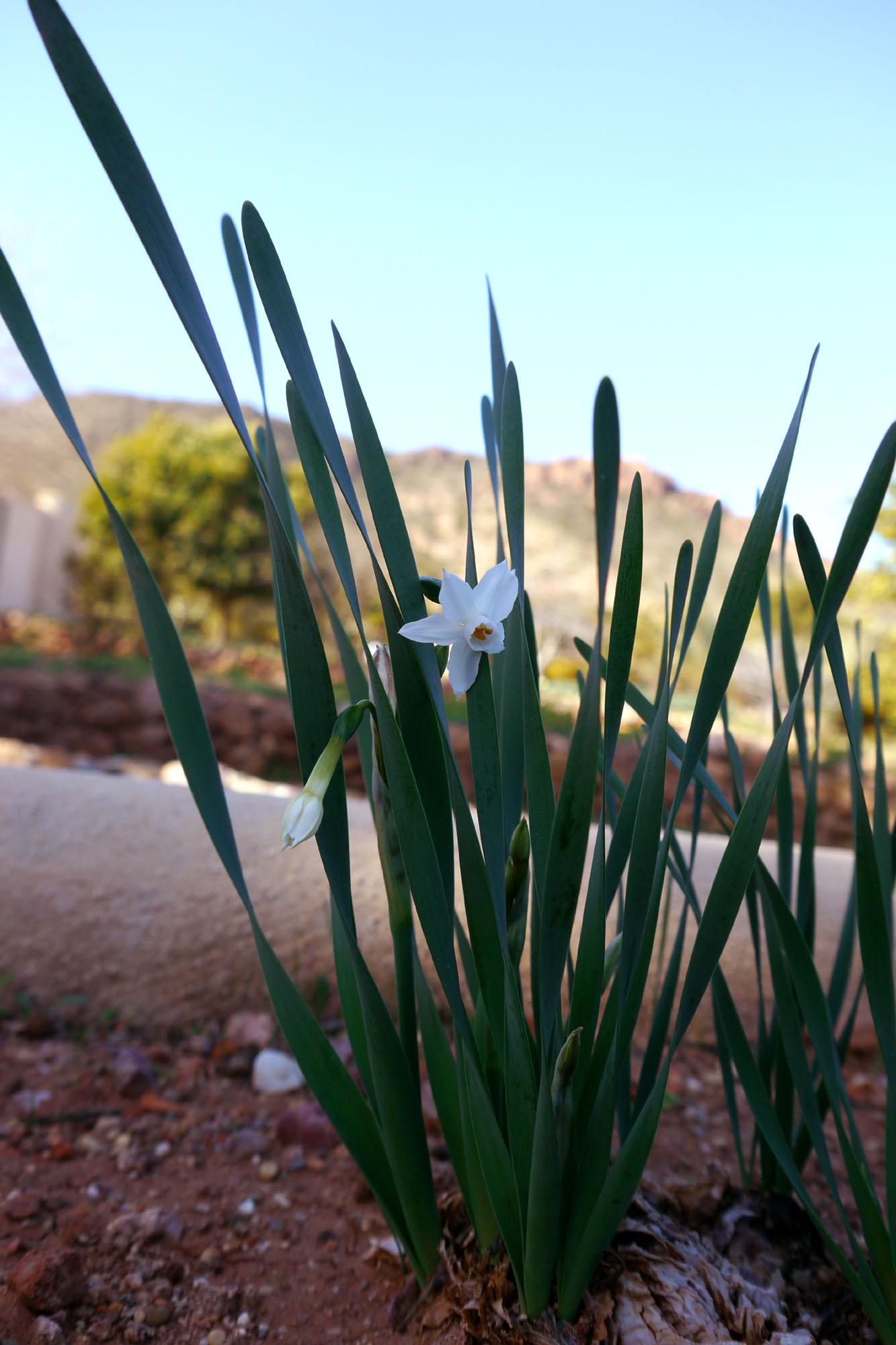 Narcissus tortifolius en el jardín botánico de Rodálquilar (Almería, España).